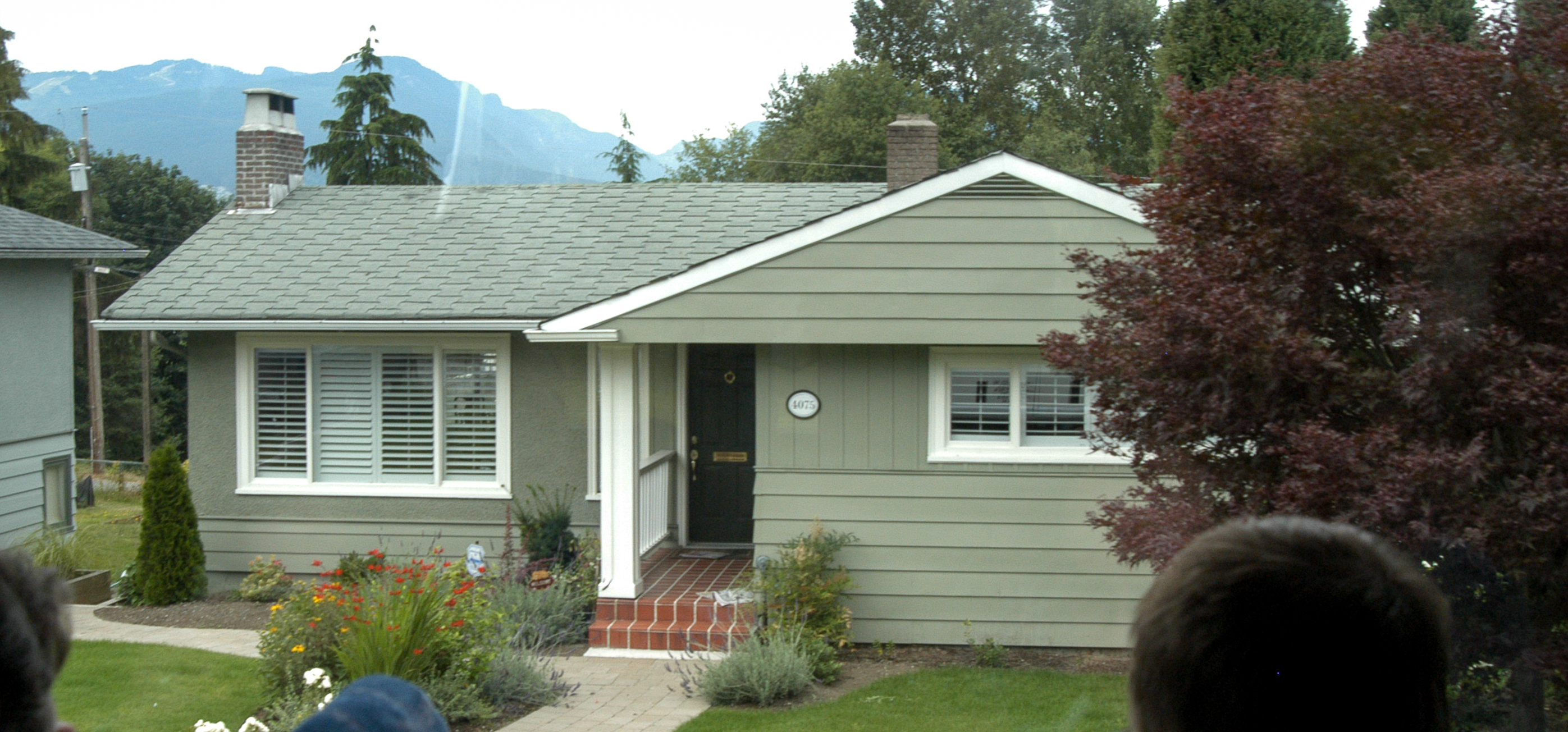 4075 Edinburgh Street. Seen in Stargate SG-1 episode #715 "Chimera".